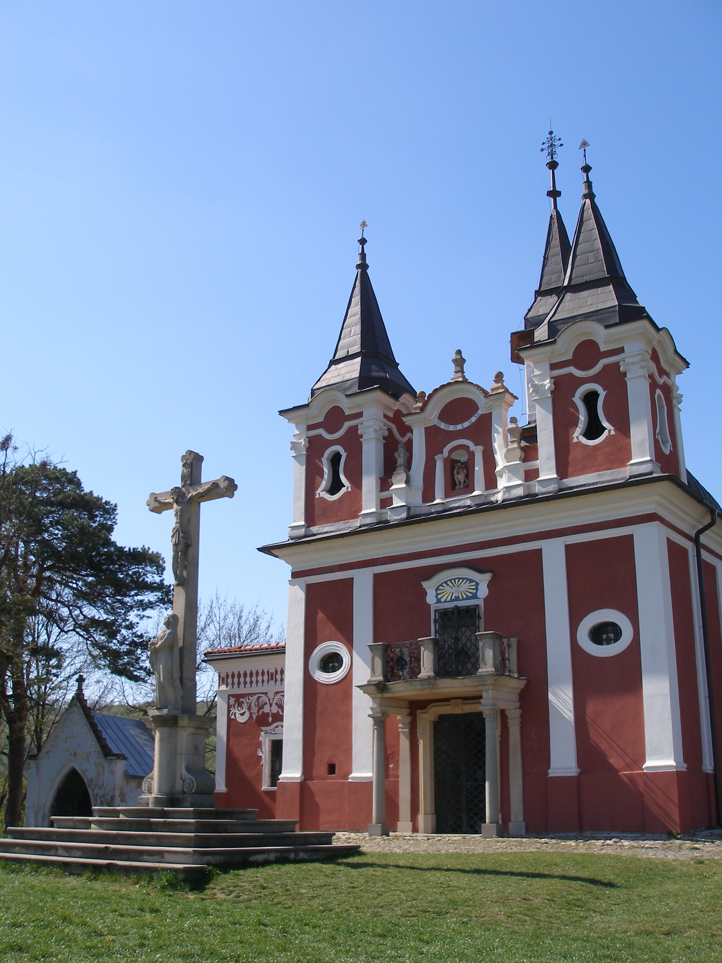 Kostol na Kalvárii v Prešove